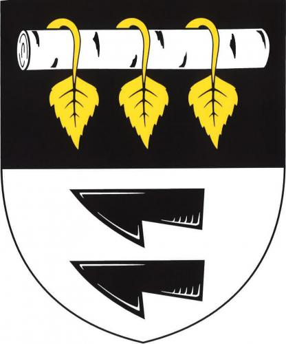 Březí, okres Žďár nad Sázavou, znak